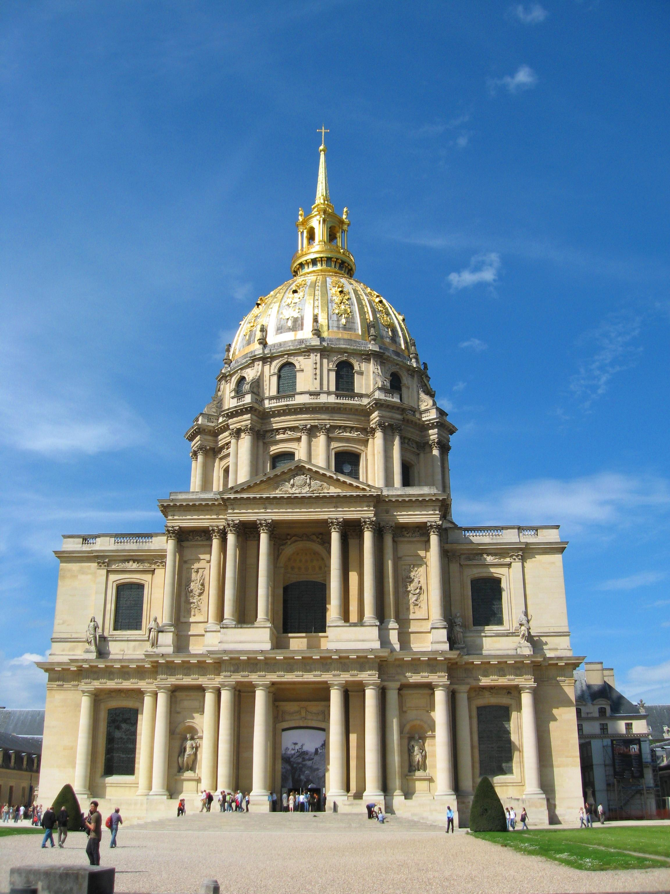 Zgradba Les Invalides v Parizu.